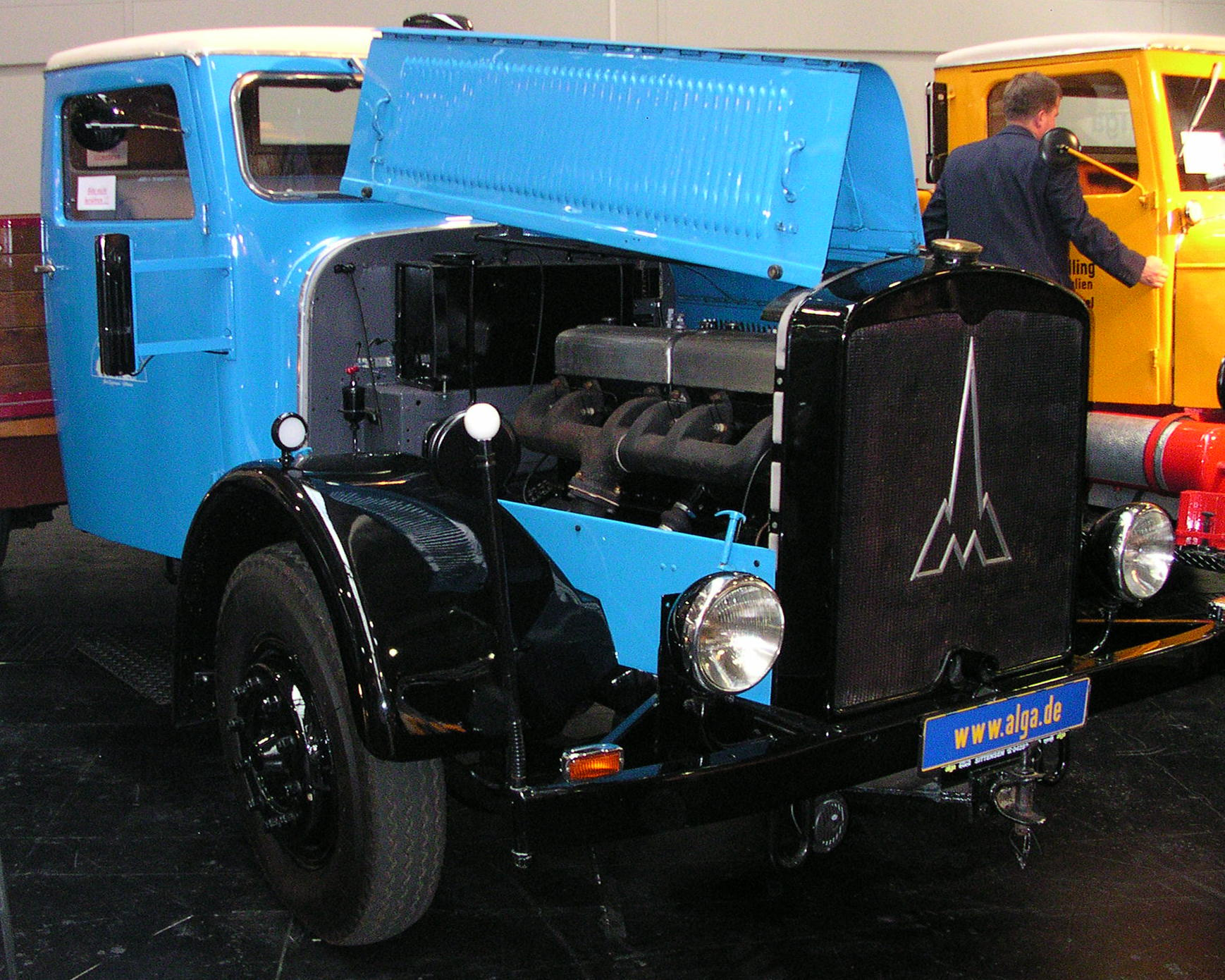 Nutzfahrzeug-IAA, Hannover 2004, Magirus M 40, Baujahr 1939